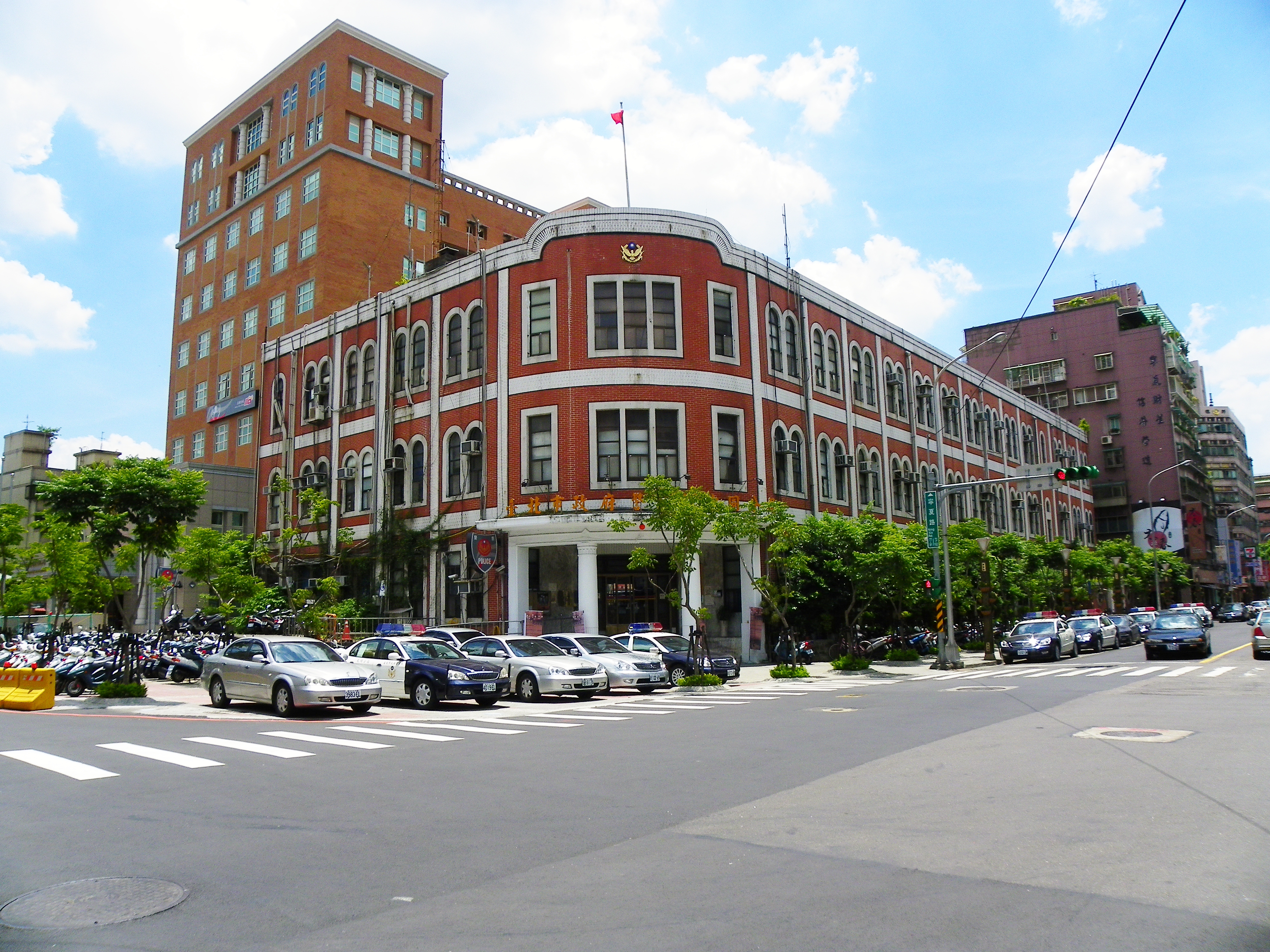 臺北市政府警察局大同分局，後方（東側）的高樓是大同分局新大樓，攝於寧夏路與錦西街口。